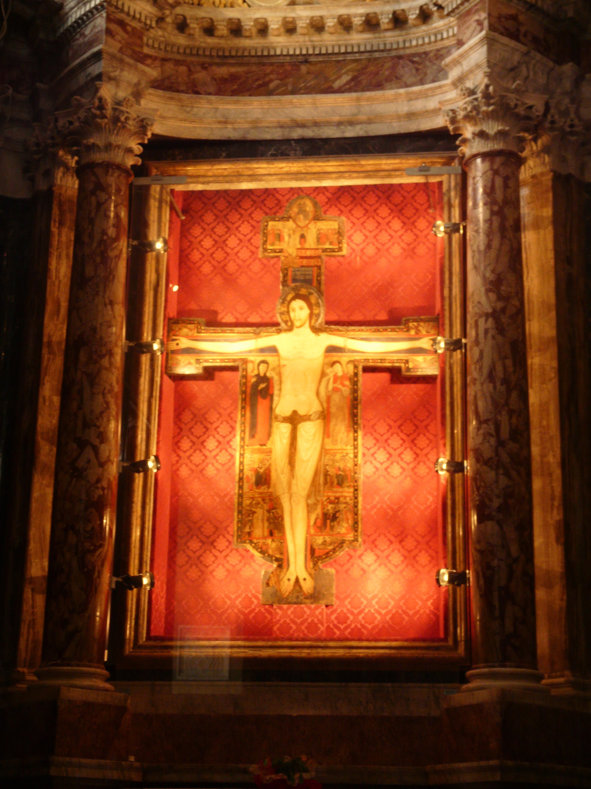 Altare della Cattedrale di Santa Maria Assunta, Sarzana, Liguria, Italia